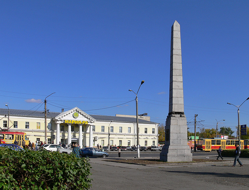 Demidovského náměstí a Demidovského sloup v Barnaulu, Rusko